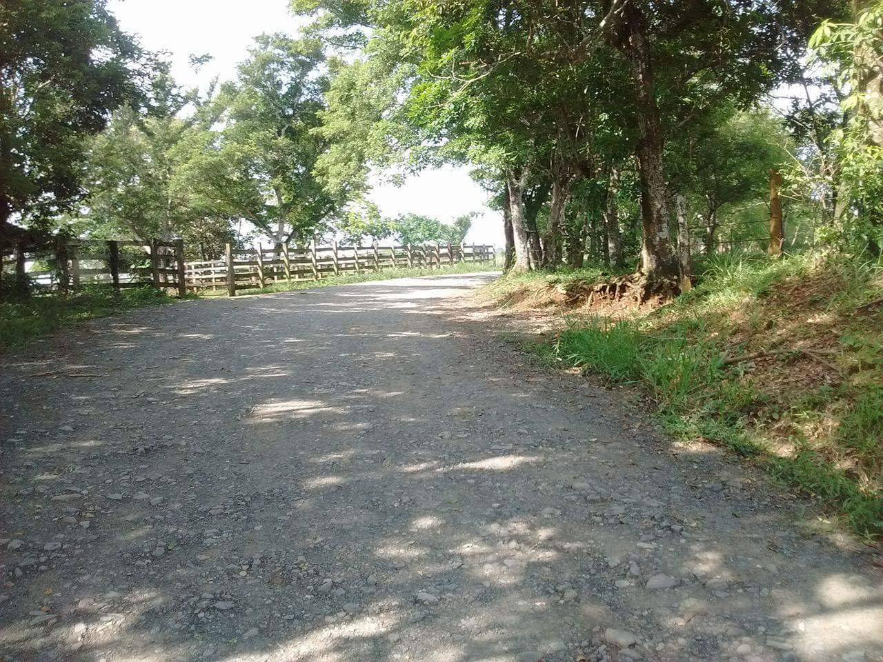 Flora de Juan de la Luz Enriquez Jesus carranza Veracruz Cocuites y otros arboles